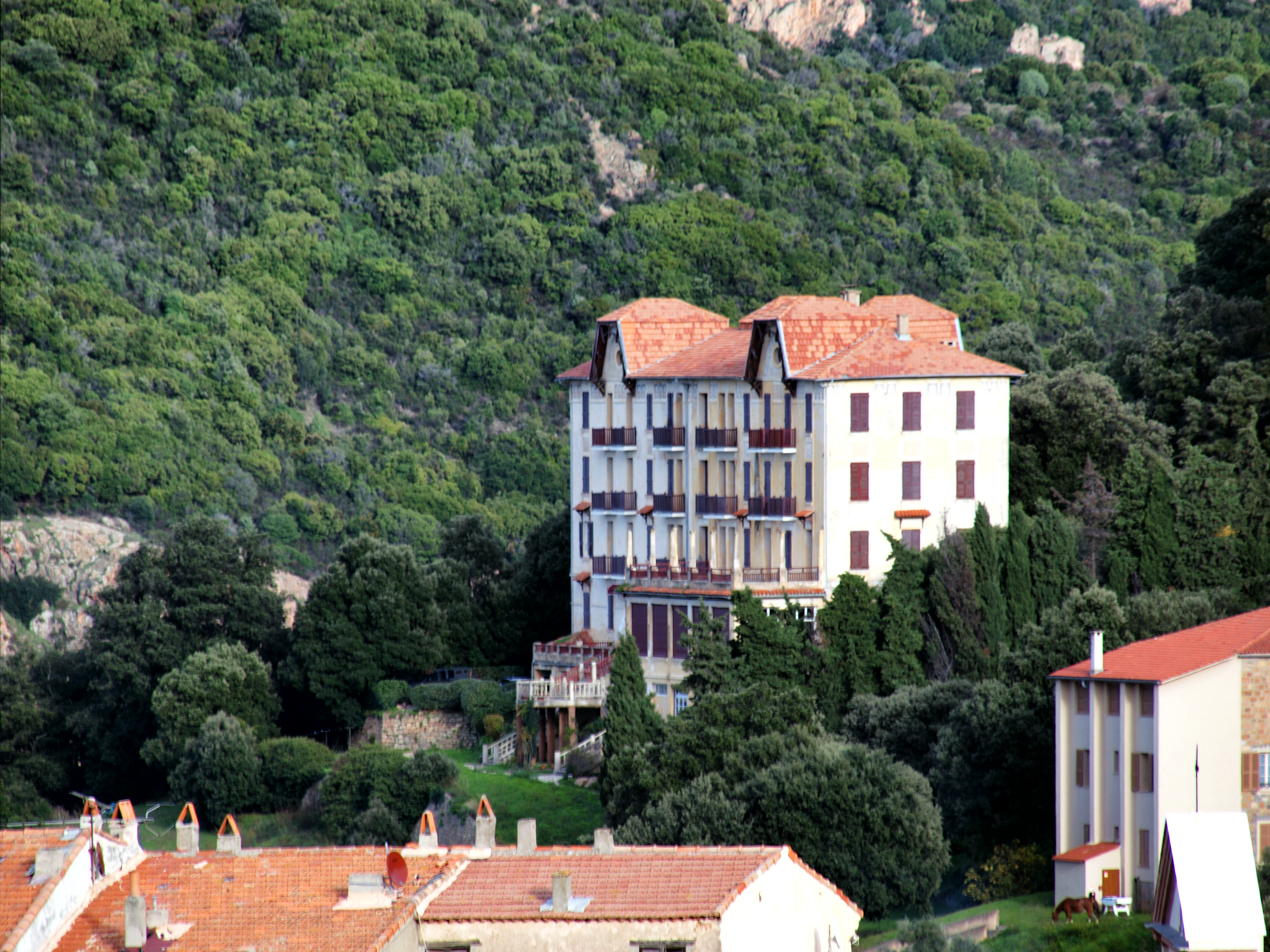 Piana, Corse-du-Sud - Hôtel Les Roches Rouges, Label « Patrimoine du XXe siècle »